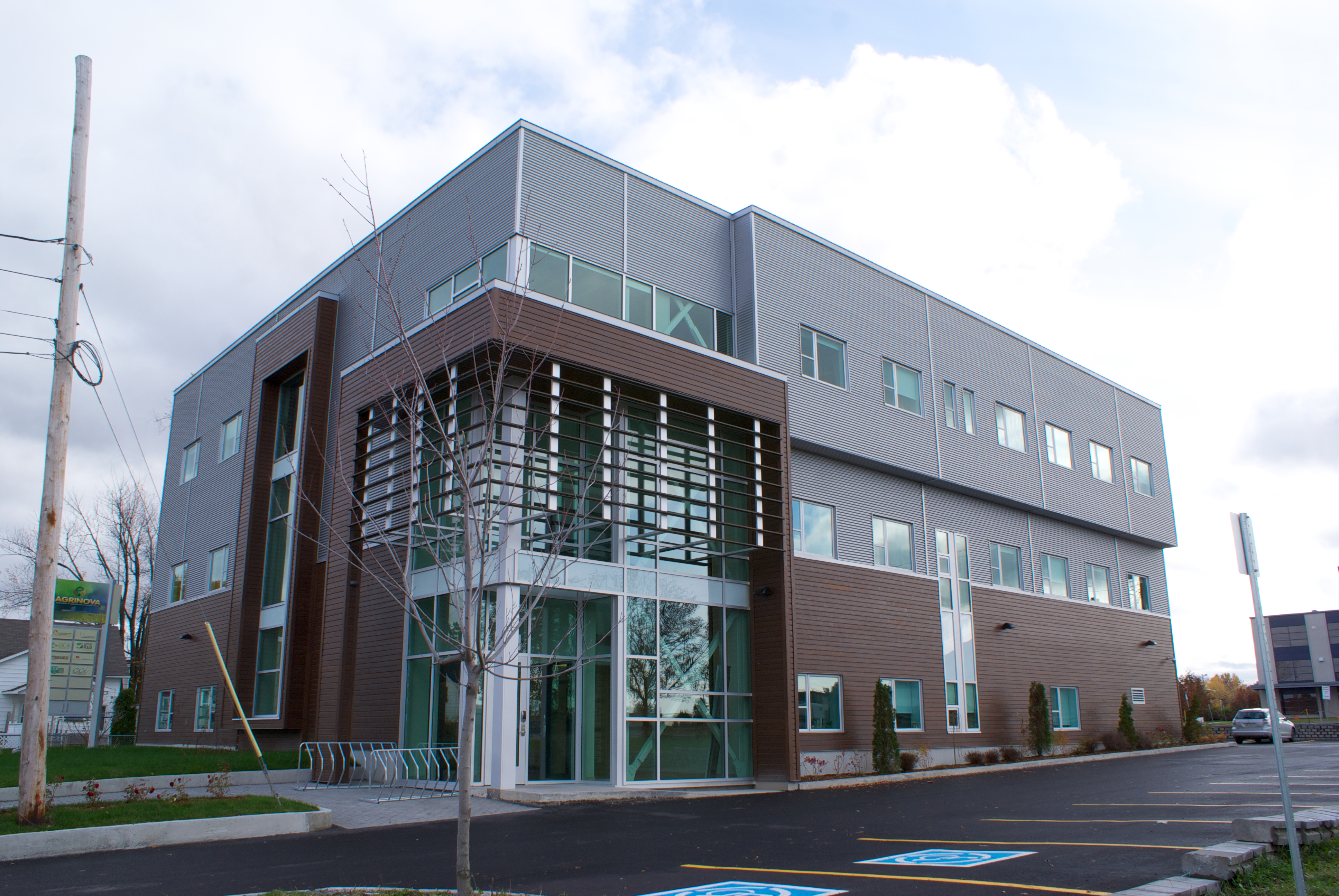 Centre de recherche en agriculture Agrinova du Collège d'Alma